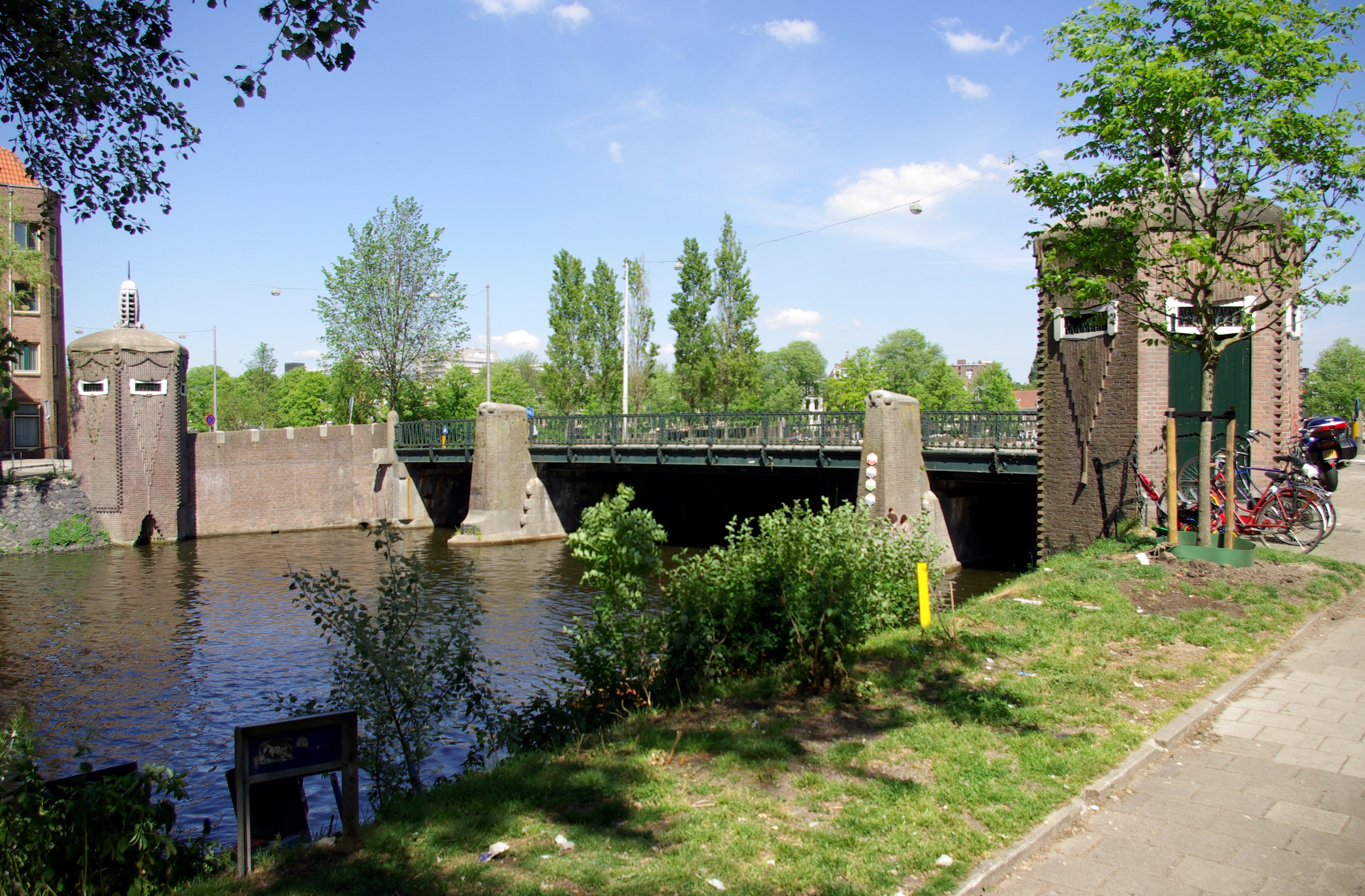 P.L. Kramerbrug (Brug 400), Amstelkade / Amsteldijk, Amsterdam 46″ N, 4° 54′ 35.26″ E